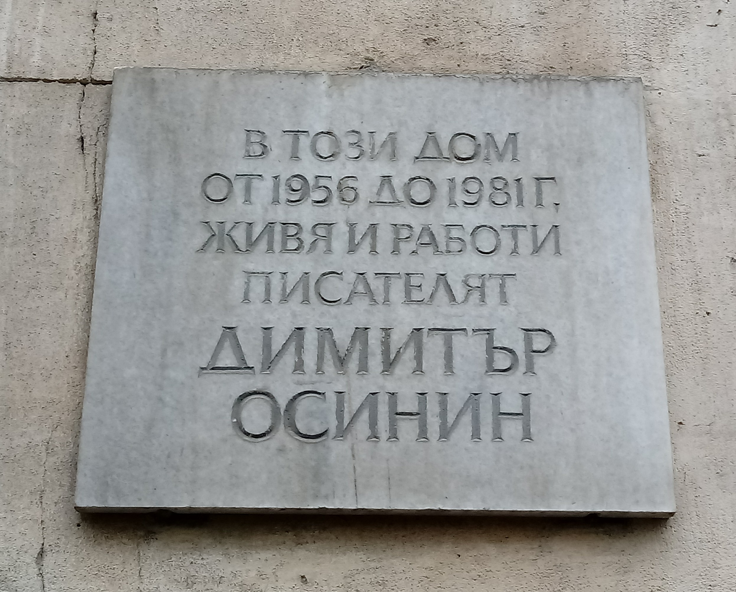 Dimitar Osinin memorial plaque, 5V Dondukov Blvd. Sofia